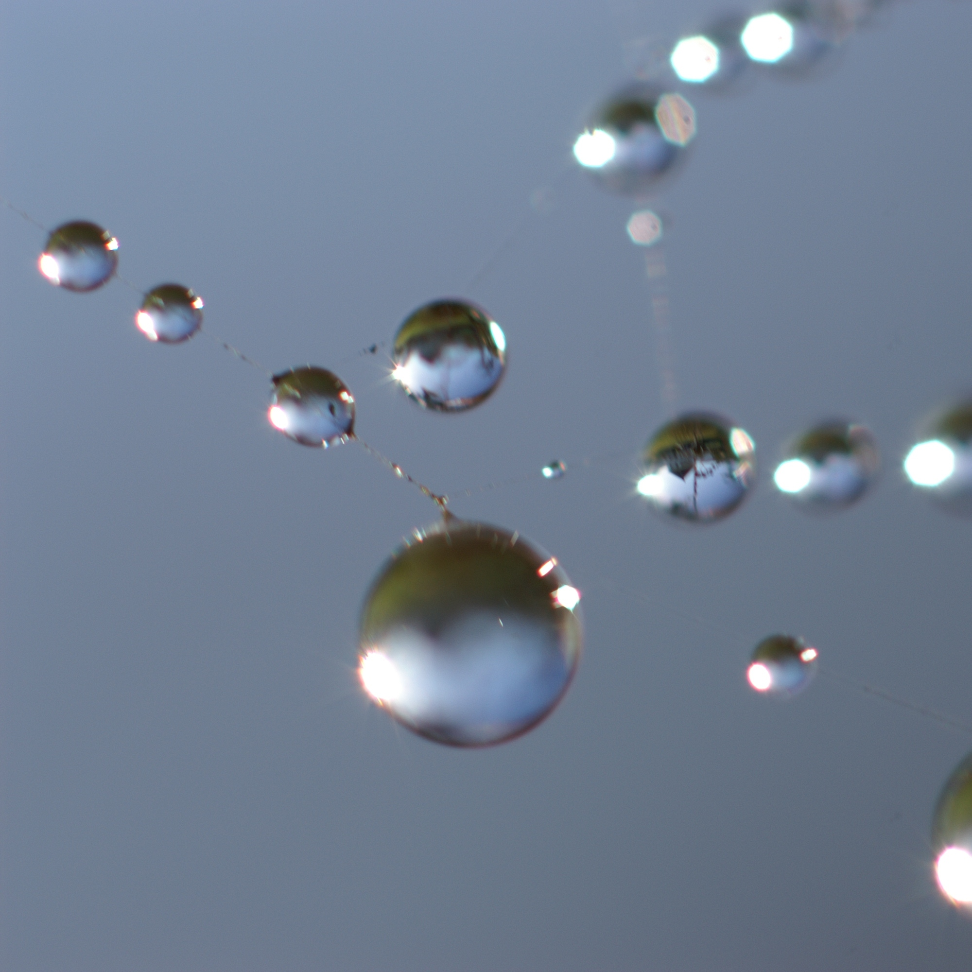 Tautropfen im Spinnennetz.